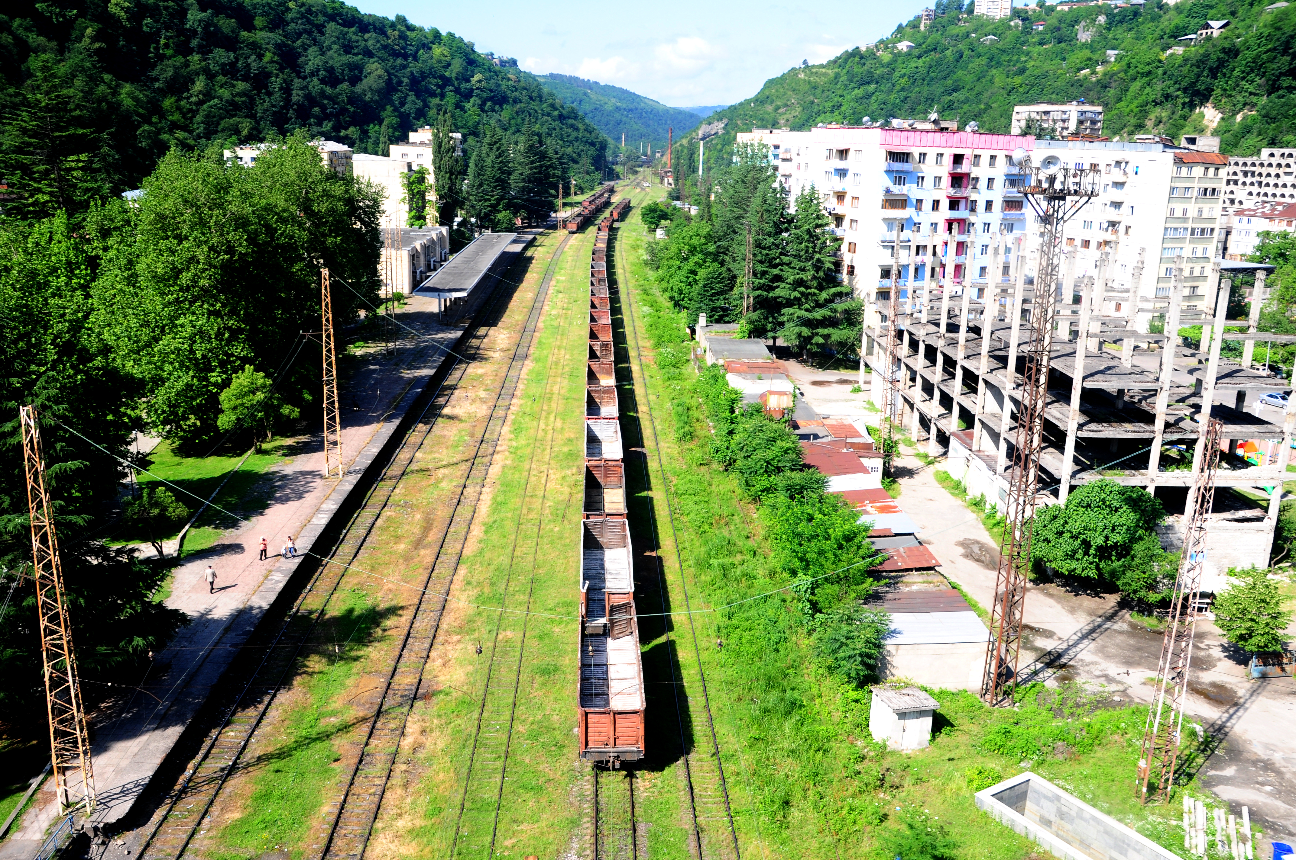 Chiatura